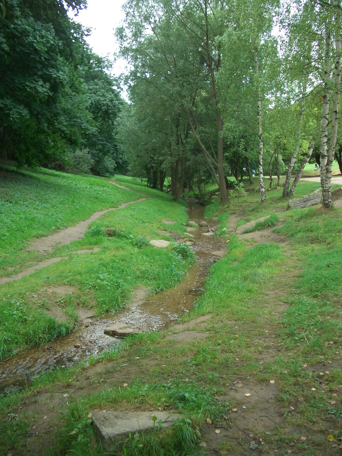 Голосов овраг